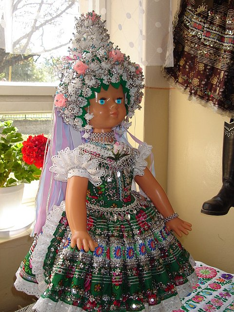 Krojovaná bábika z Čajkova.